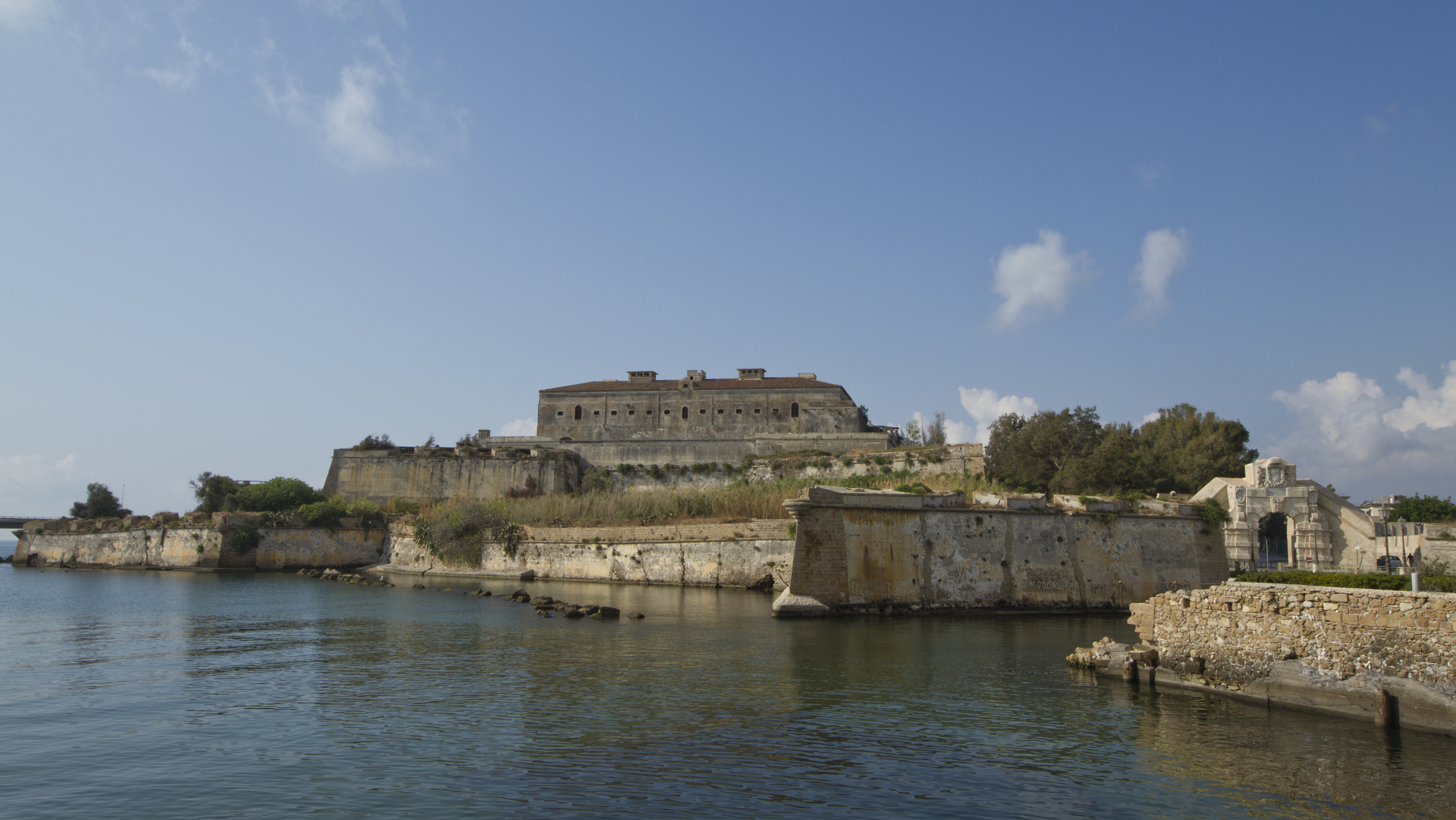 Augusta - Castello Svevo e Cinta Bastionata